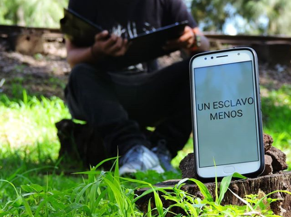 Foto que participó en el concurso de la CNDH con el fin de alejarnos un poco de la tecnología.